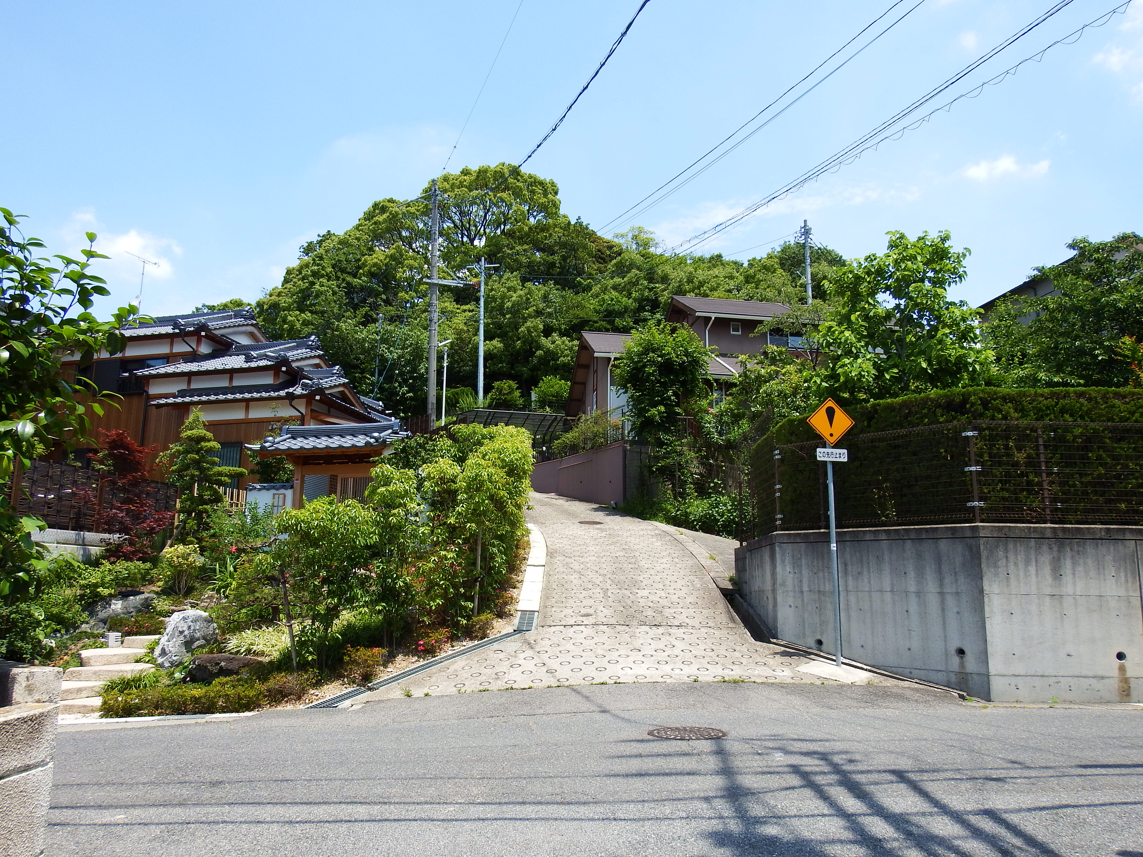 奥が丸根砦址